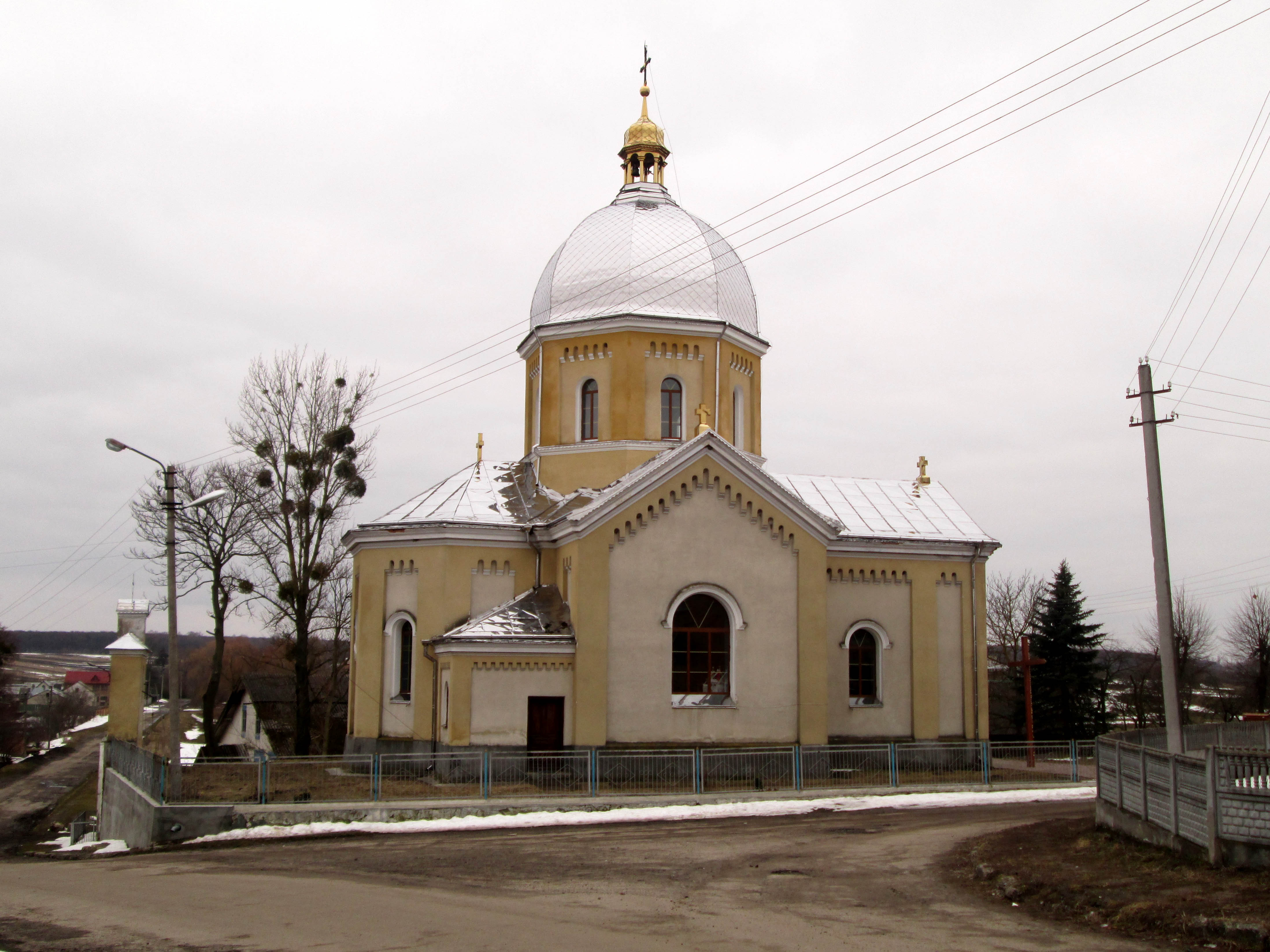 Церква Успіння Пресвятої Богородиці у Старому Милятині. Архітектор Михайло Голейко (1844-1906).